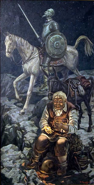 «Дон Кихот и Санчо Пансе. Звезды и золото» "Don Quijote und Sancho Pansa. Sterne und Gold" х. м. 1980 142х75